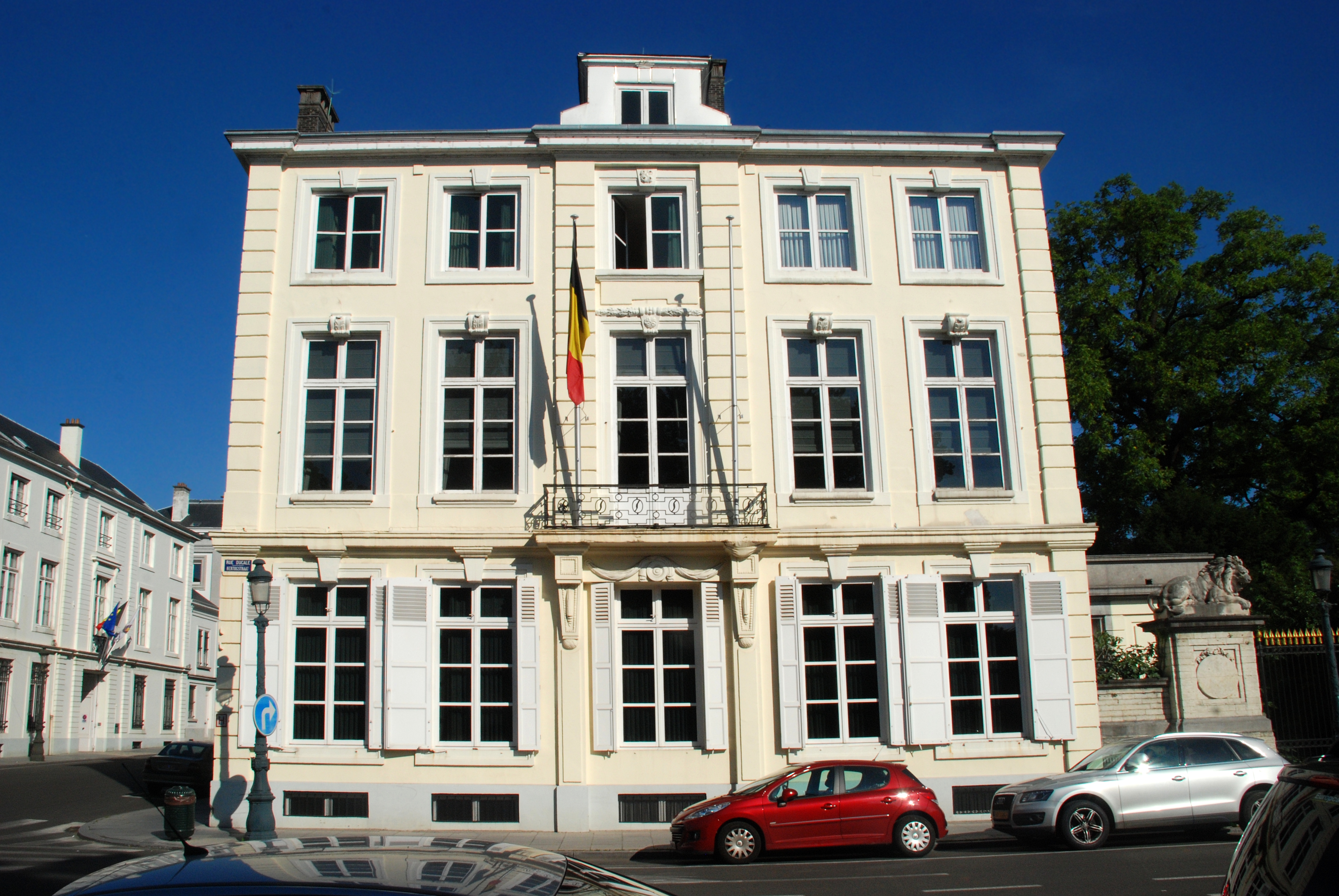 Belgique - Bruxelles - Résidence du Premier ministre de Belgique (le "Lambermont")